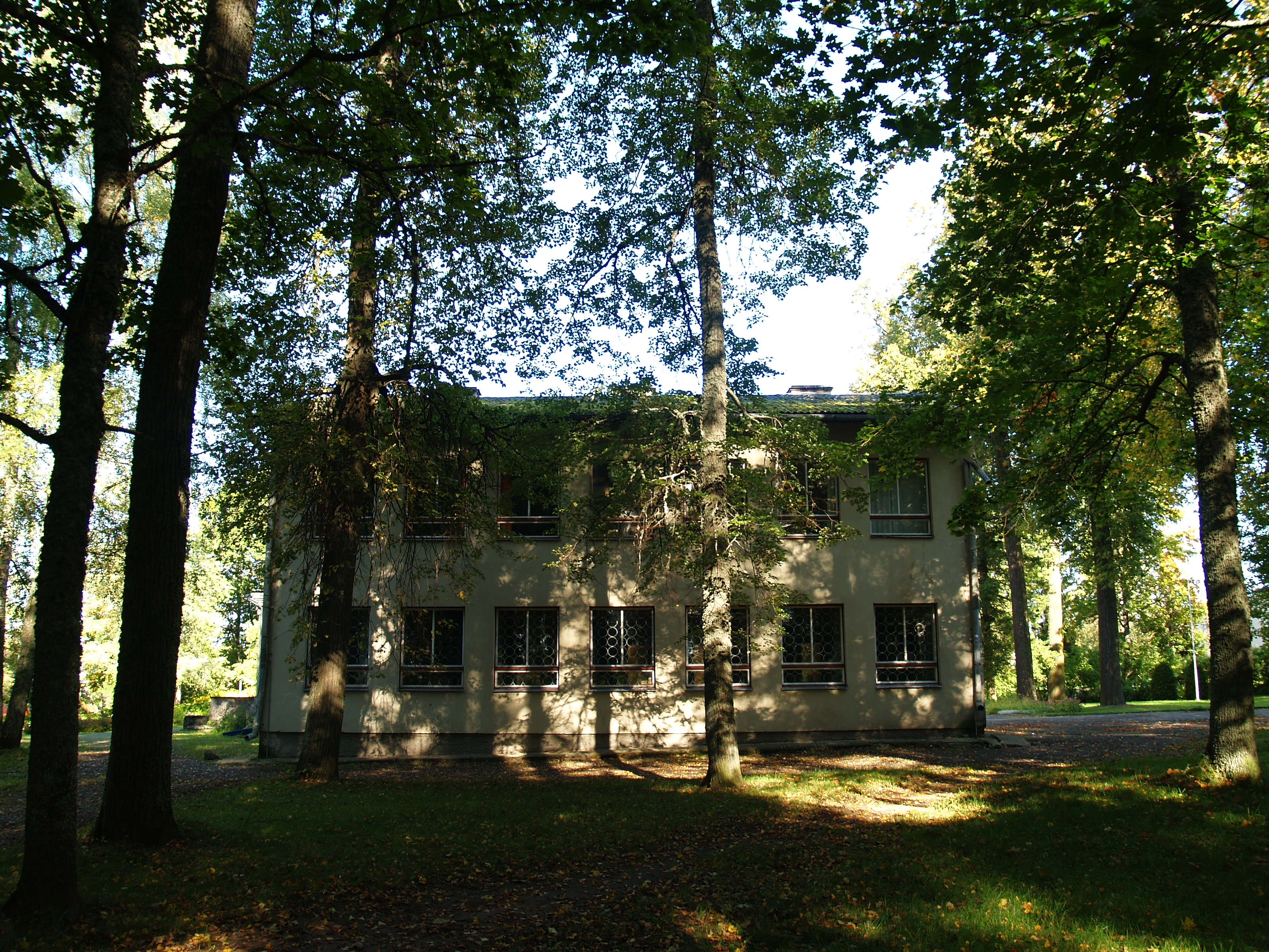 Kuuste raamatukogu